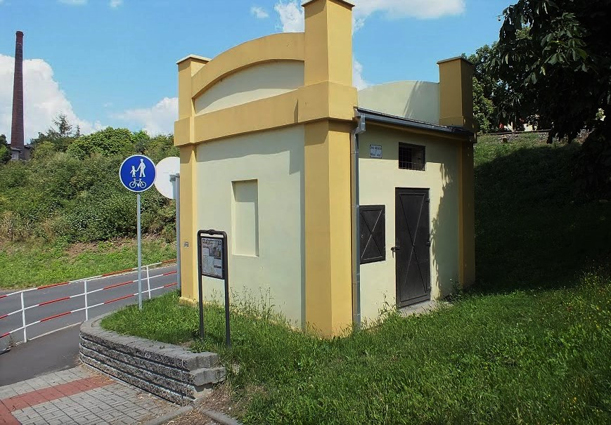 Kadaň, trafostanice, ulice Skalní